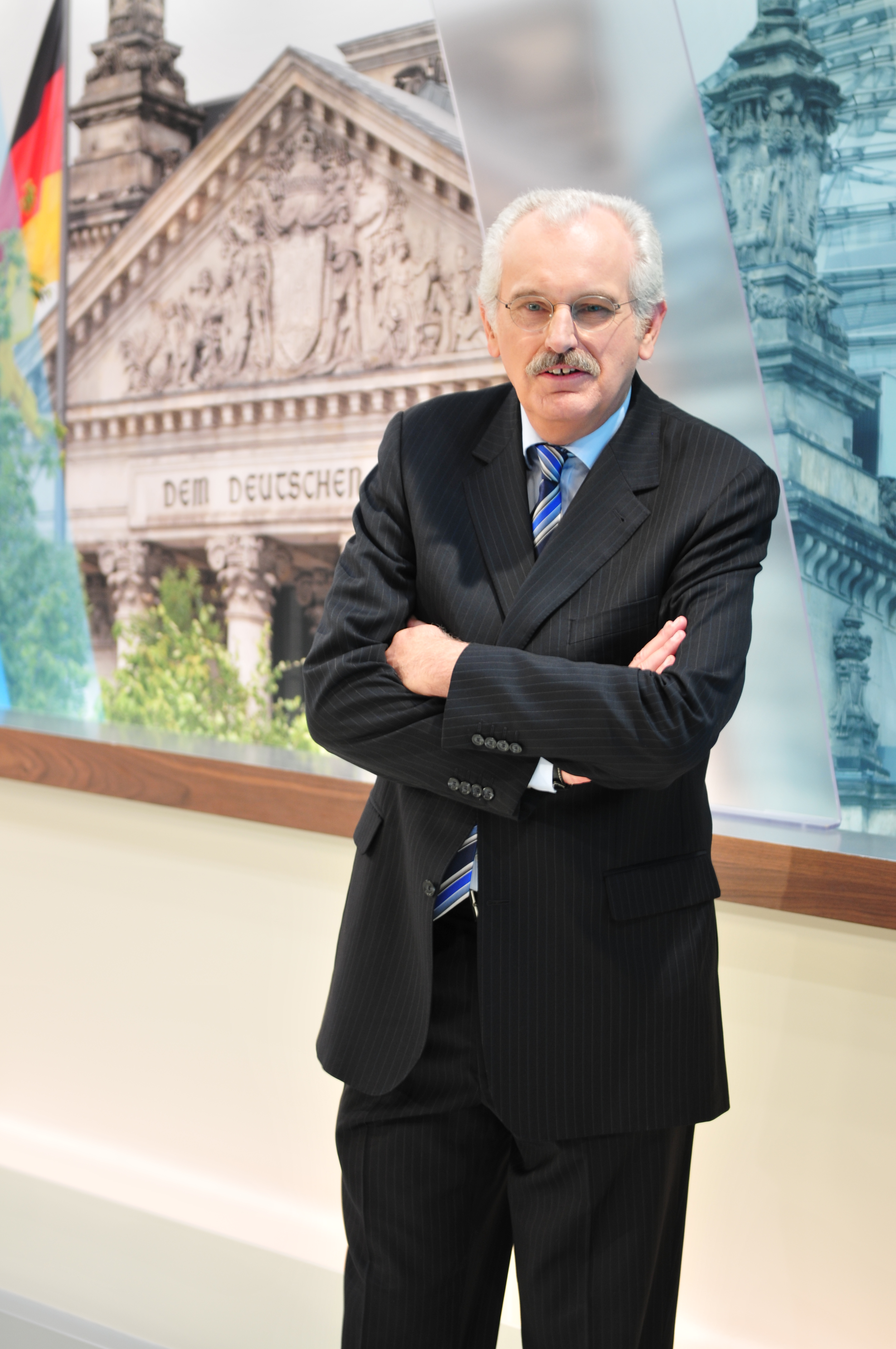 Berichterstattung zur Bundestagswahl aus dem Hauptstadtstudio Berlin; Pressetermin am 20. Sept. 2013